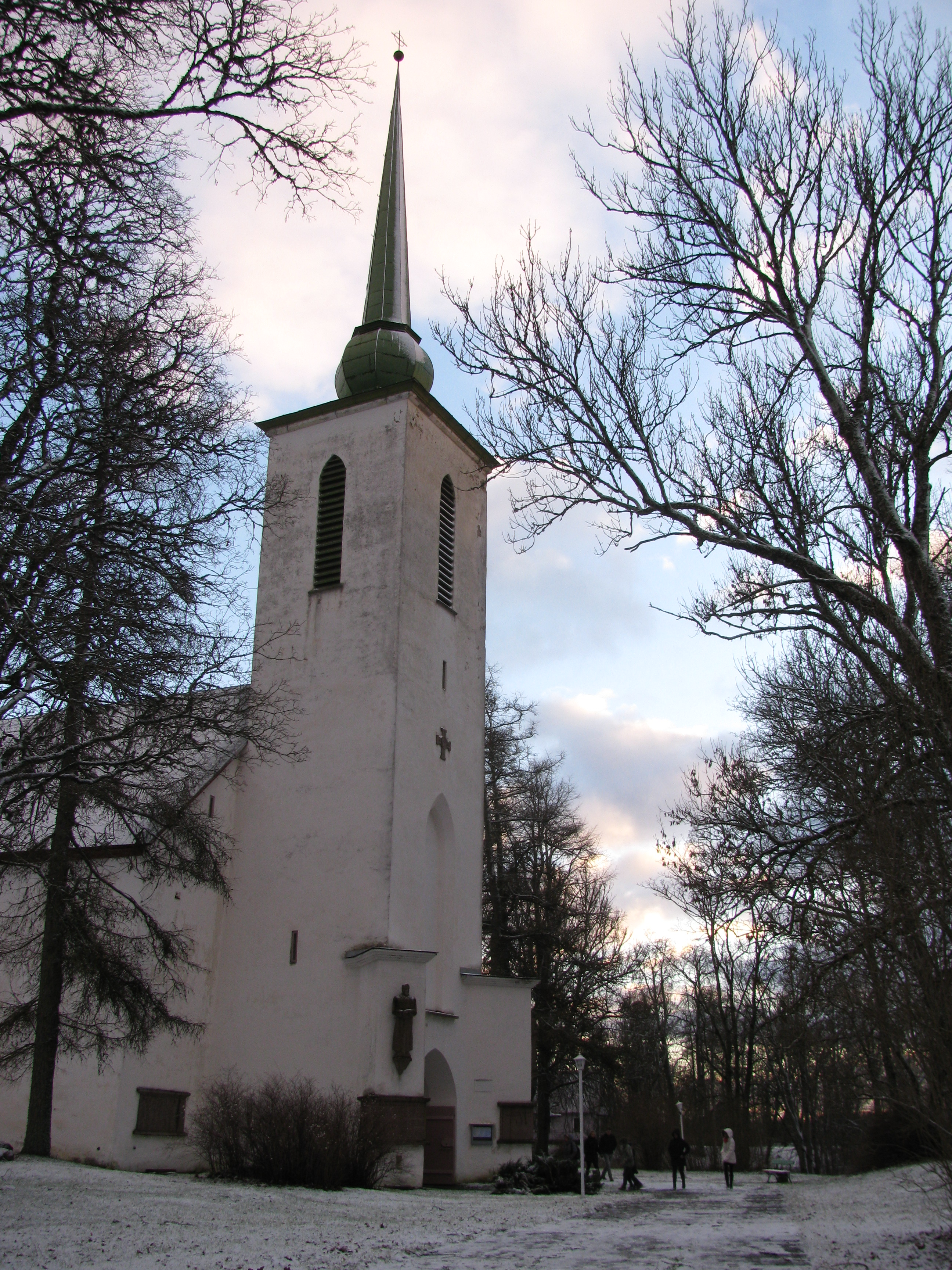 Vigala Maarja kirik